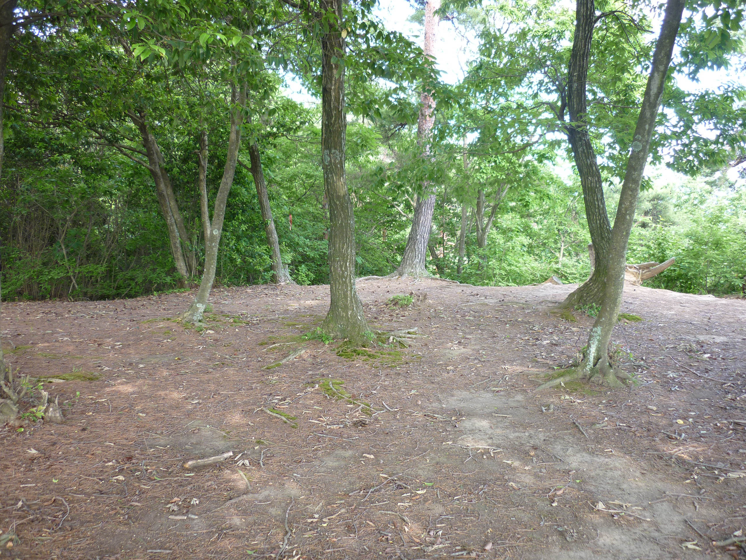 本丸跡